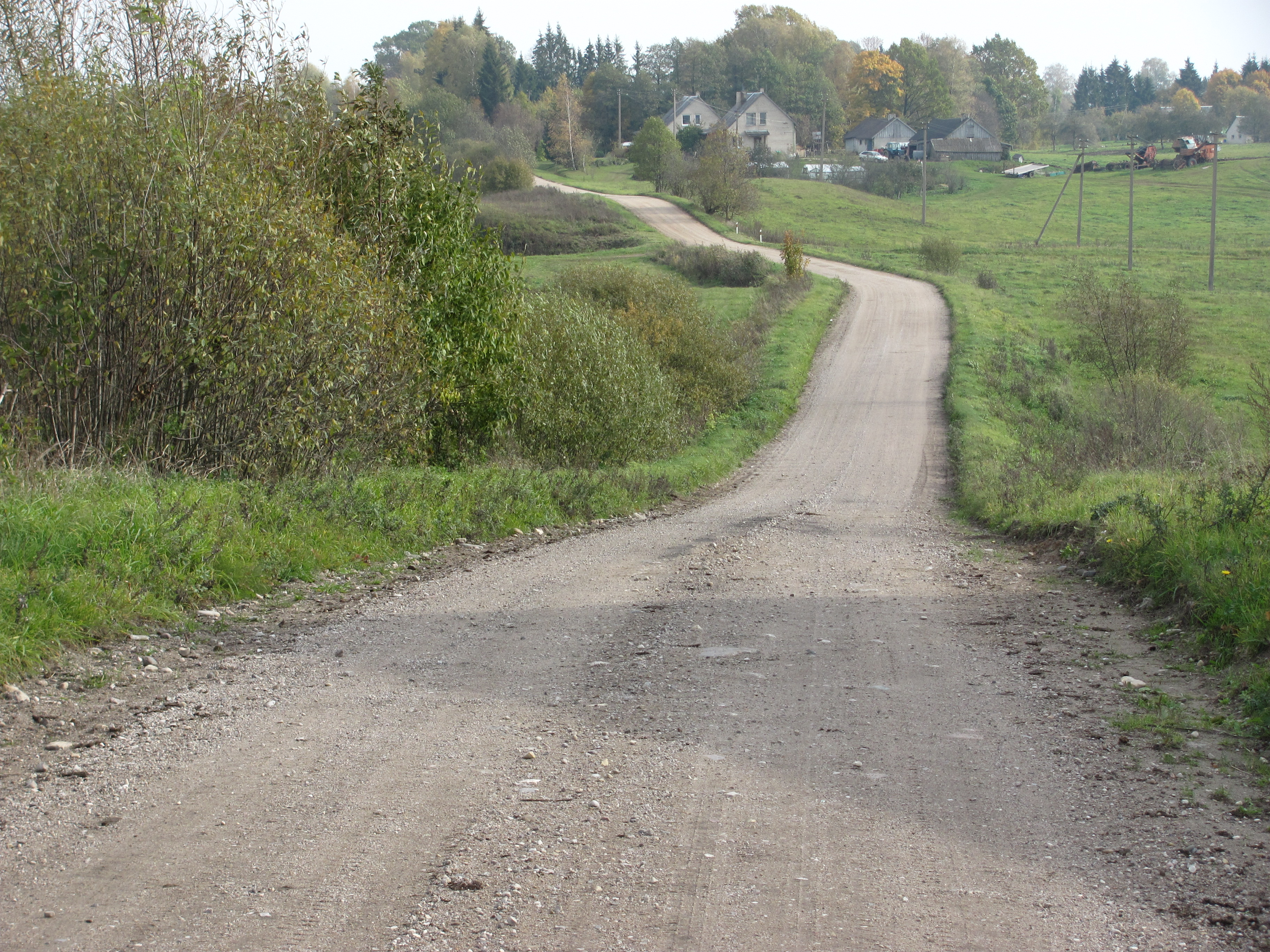 Lėliai 28380, Lithuania